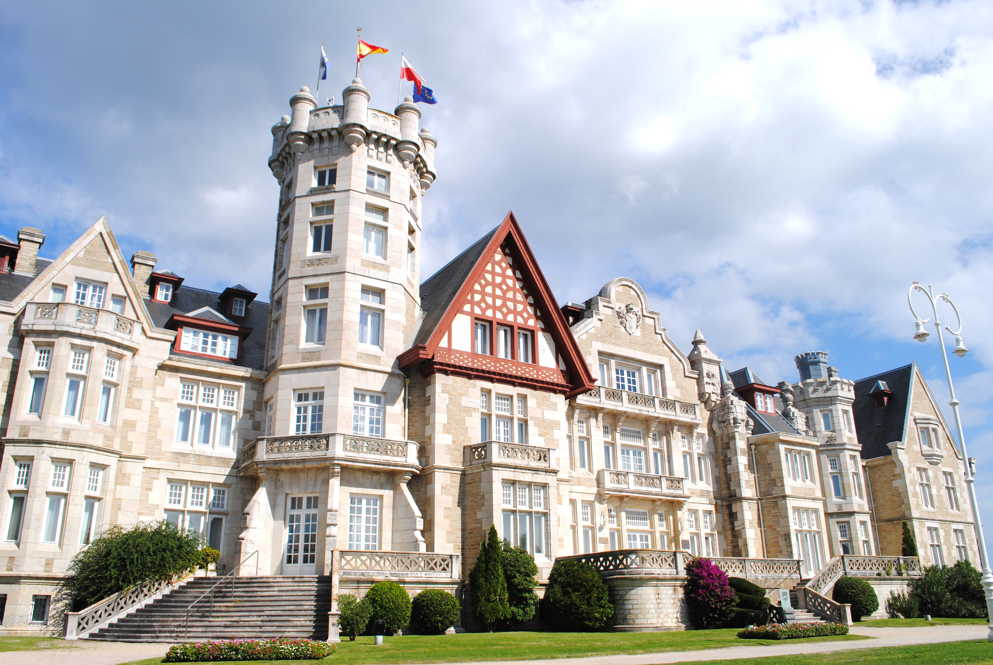 Vista de la fachada principal del palacio de la Magdalena